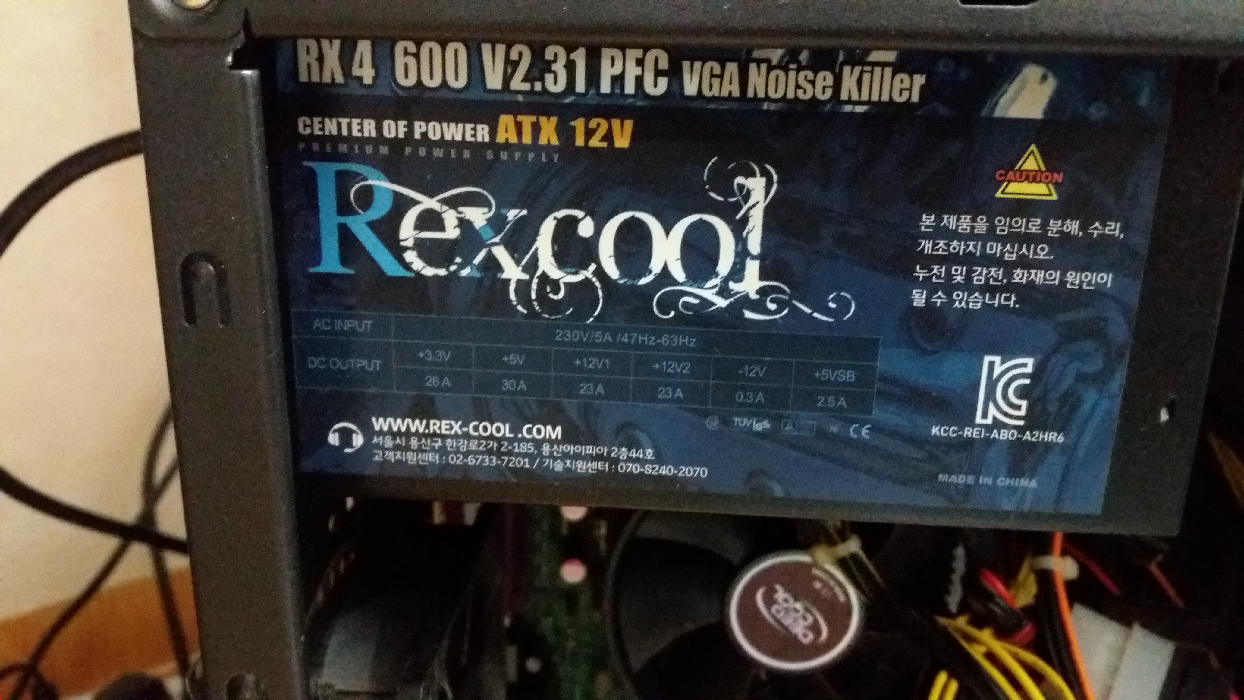 컴퓨터 전원공급장치(파워서플라이)